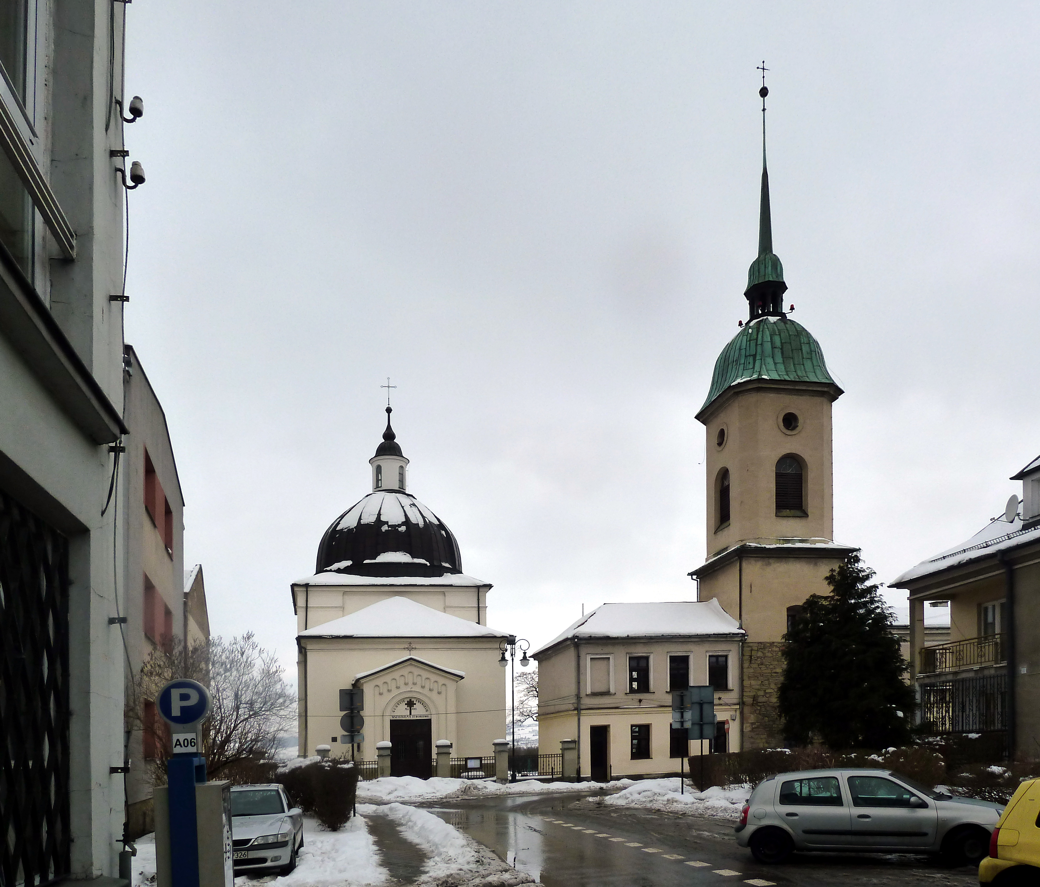 kościół pofranciszkański p.w. Narodzenia NP Marii - ob. ewangelicki Nowy Sącz ul. Pijarska 21, Nowy Sącz